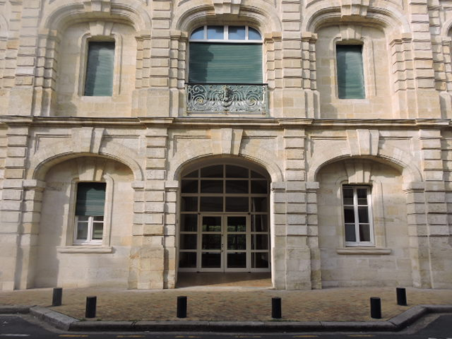 Photo représentant la façade du théâtre de l'Alhambra de Bordeaux